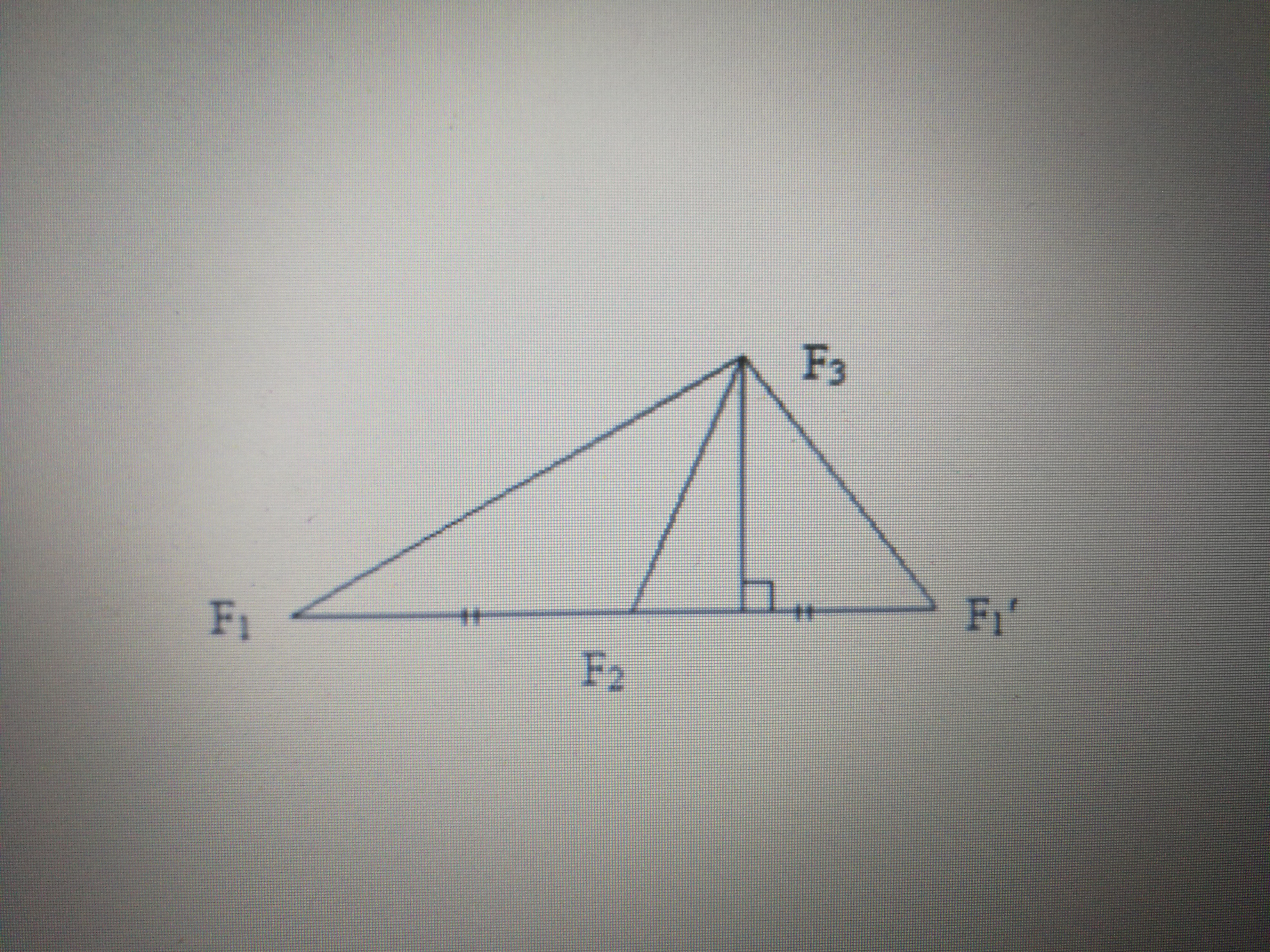 Ģeometriskie invarianti - laukums